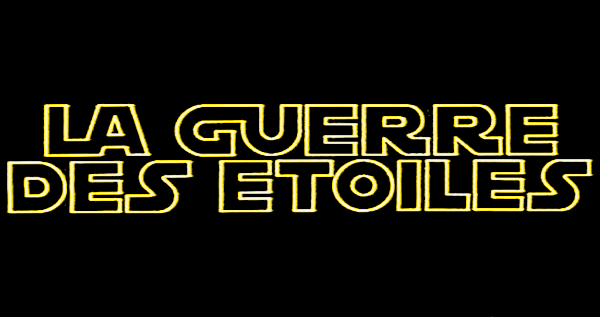 Ancien logo français de Star Wars (La Guerre des étoiles) inspiré de cette image : [1] Auteur : LucasArt et Cody escadron delta